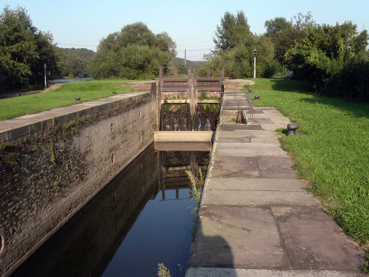 Alte Schleuse in Essen-Horst